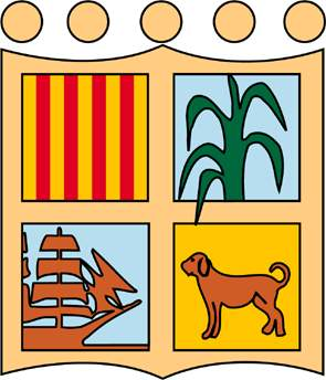 Escudo de Canet de Mar